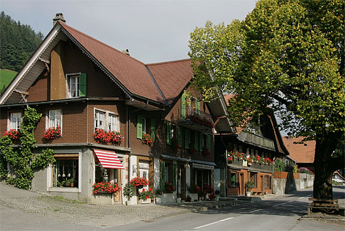 Dorfzentrum Guggisberg